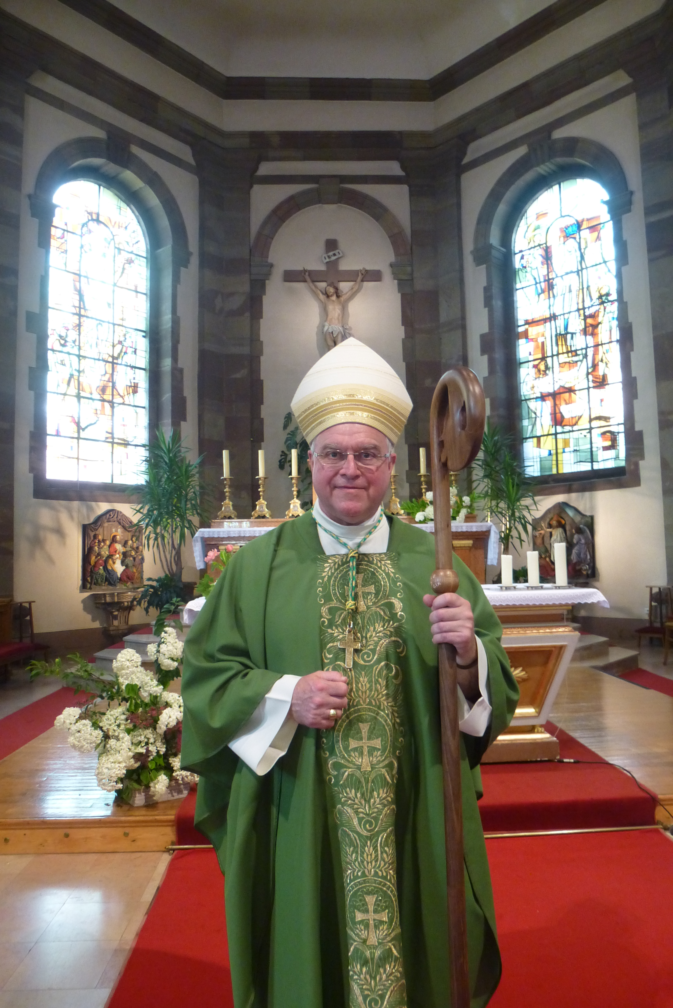 Monseigneur Jean-Christophe Lagleize, évêque de Valence de 2001 à 2013 et évêque de Metz, dans l'église Sainte Catherine de Bitche lors des rencontres nationales de la Jeunesse Franciscaine.